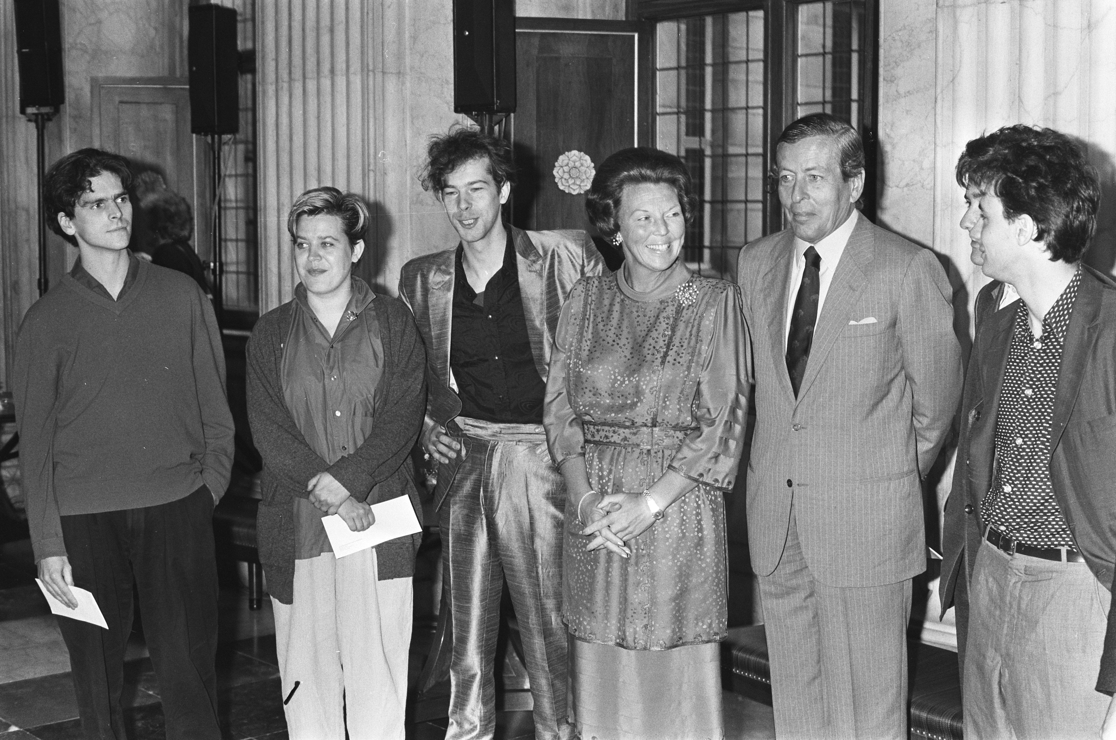 Collectie / Archief : Fotocollectie Anefo Reportage / Serie : [ onbekend ] Beschrijving : Koningin Beatrix reikt in Paleis op de Dam de prijzen voor de Vrije Schilderkunst uit. De zes prijswinnaars zijn: Ellen van Eldik uit Nijmegen, Lex van Lith uit Tilburg en Manel Esparbé Gasca, Reggy Gunn, Berend Hoekstra en Kees Versloot uit Amsterdam Datum : 11 oktober 1985 Locatie : Noord-Holland, Amsterdam Trefwoorden : aankomsten Persoonsnaam : Beatrix, prinses, Claus, prins Fotograaf : Vollebregt, Sjakkelien / Anefo Auteursrechthebbende : Nationaal Archief Materiaalsoort : Negatief (zwart/wit) Nummer archiefinventaris : bekijk toegang 2.24.01.05 Bestanddeelnummer : 933-4528